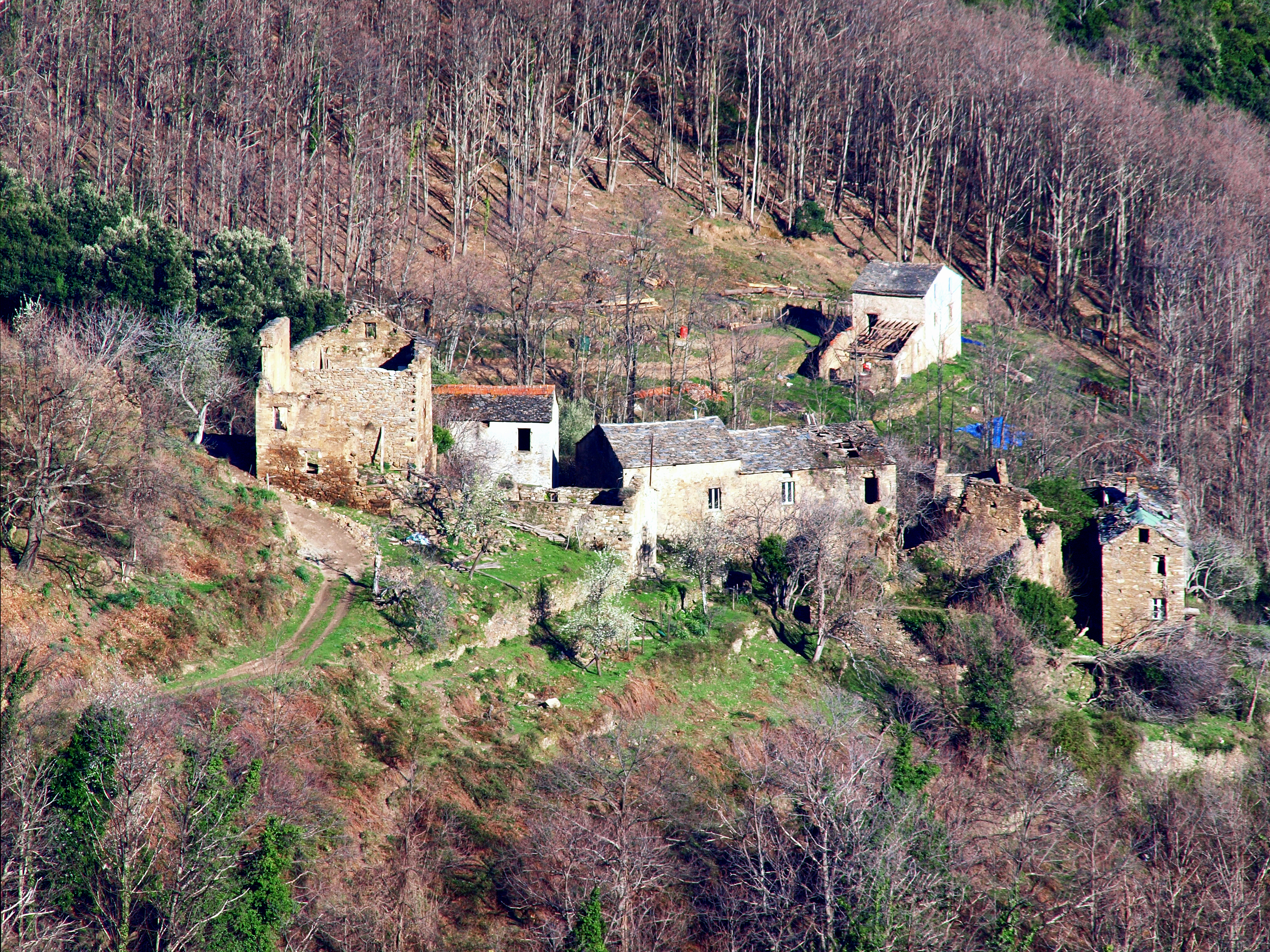 Croce, Castagniccia (Corse) - Hameau de Sorbello (Surbellu) au sud du village